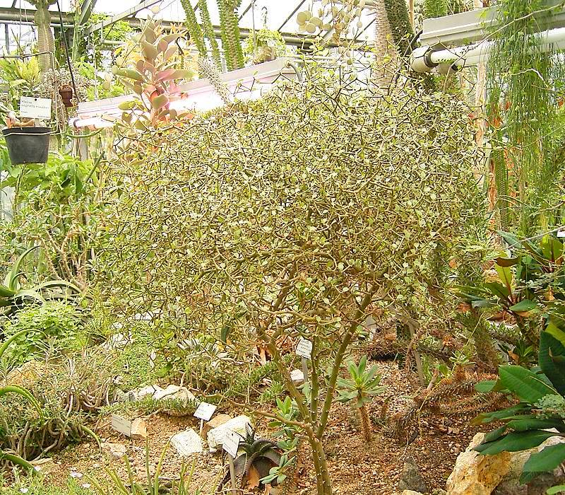 Decaria madagascariensis BG Bochum, Germany